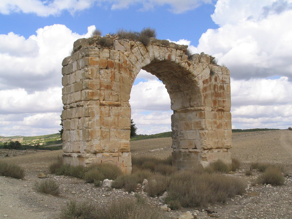 Arc de la ville romaine de Seressi